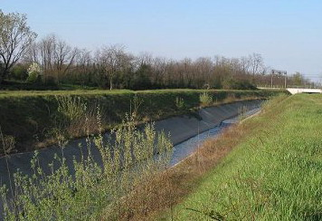 Fotografia del Canale Villoresi